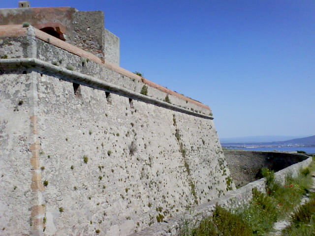 Forte Filippo (Porto Ercole) - Bastione est